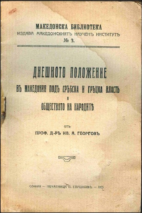 Корица на „Днешното положение в Македония под сръбска и гръцка власт и Обществото на народите“.